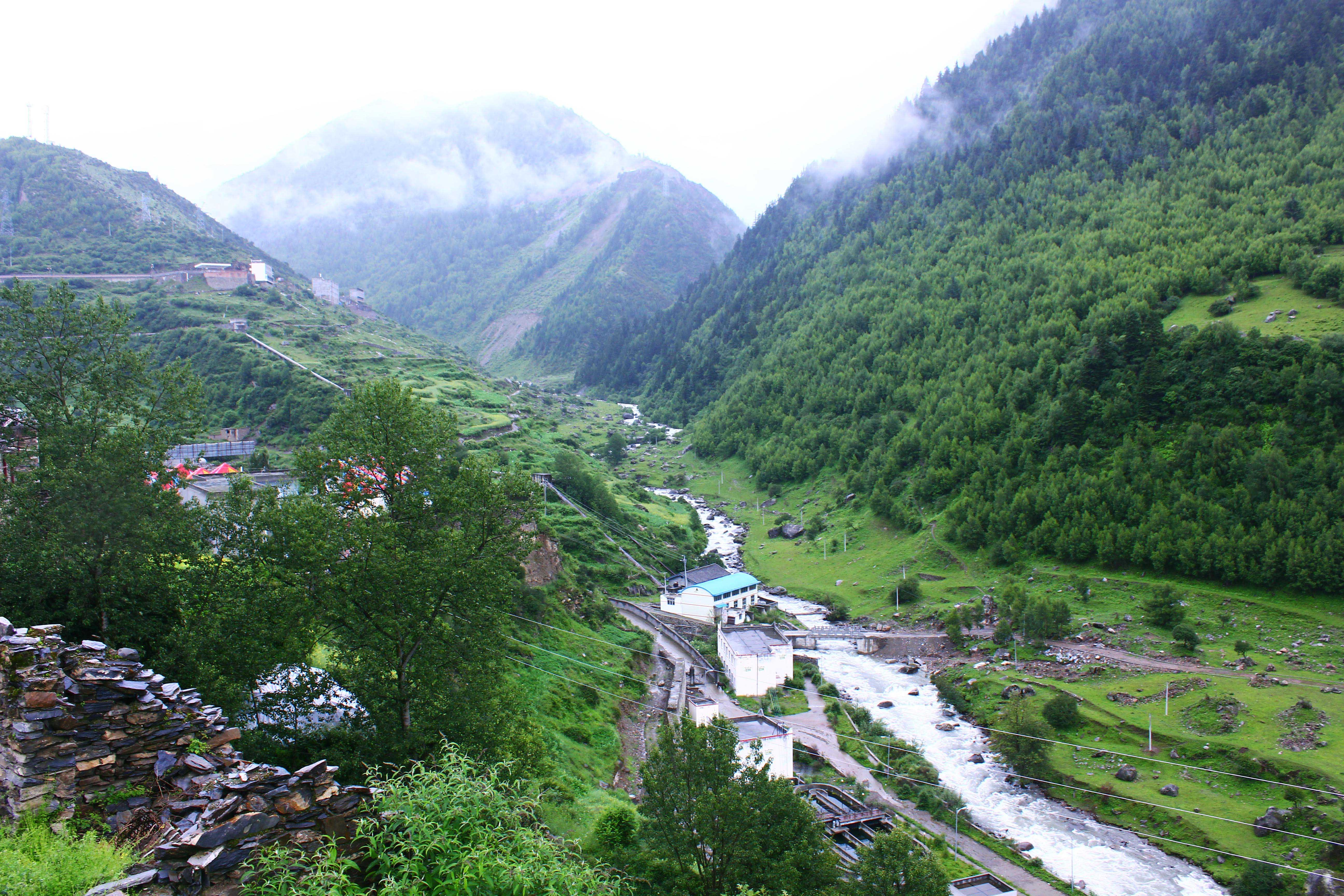 中国四川省小金县日隆镇沃日河，面向东。沃日河是大渡河支流小金川的一条支流。